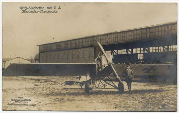 Pfalz E.V Schulterdecker mit Reihenmotor Mercedes 100 PS